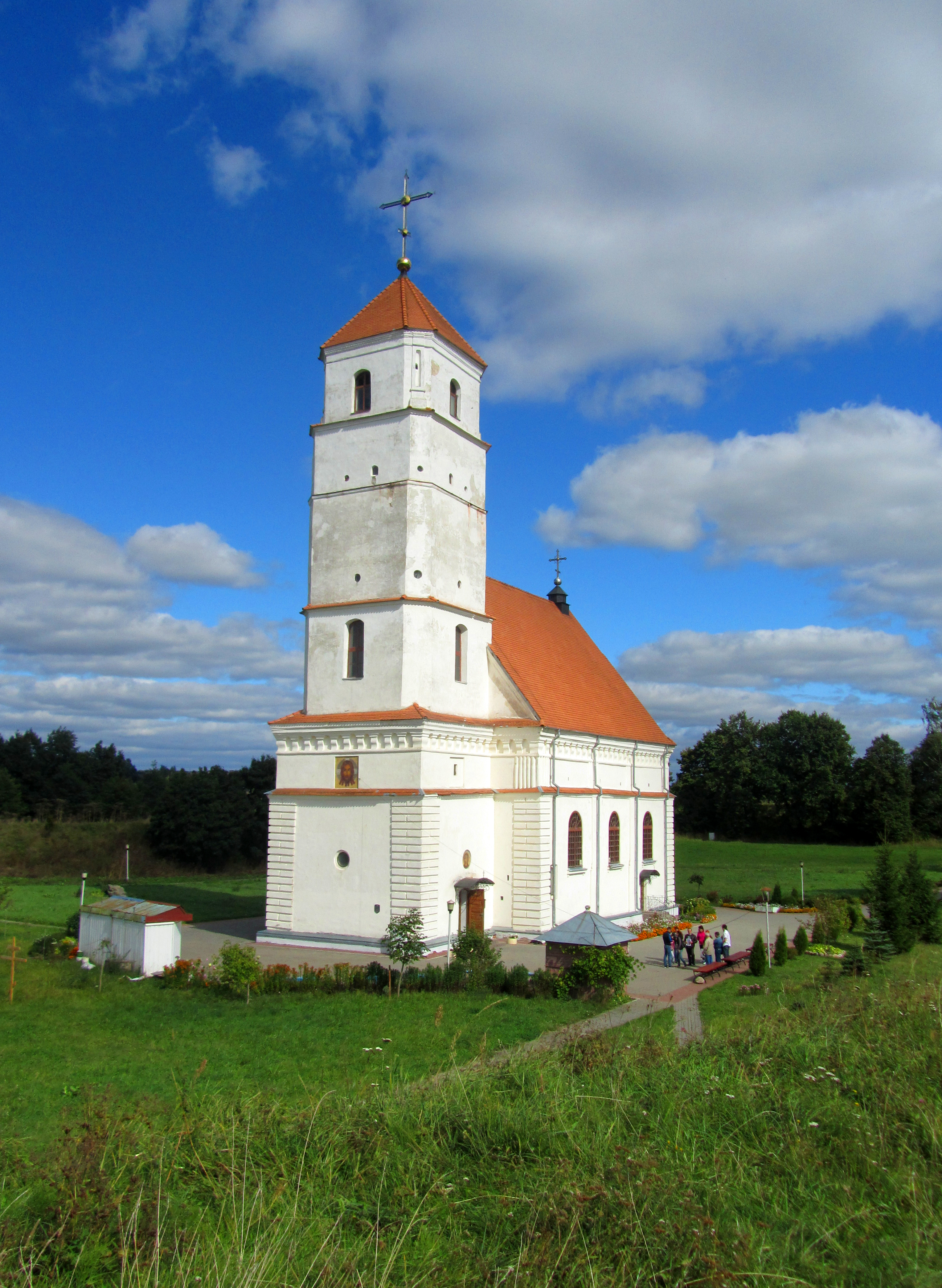 Беларуская (тарашкевіца): Спаса-Праабражэнская царква(былы кальвінскі збор). г. Заслаўе This is a photo of Belarusian heritage monument. Reference number: 611Г000335 ( WLM)